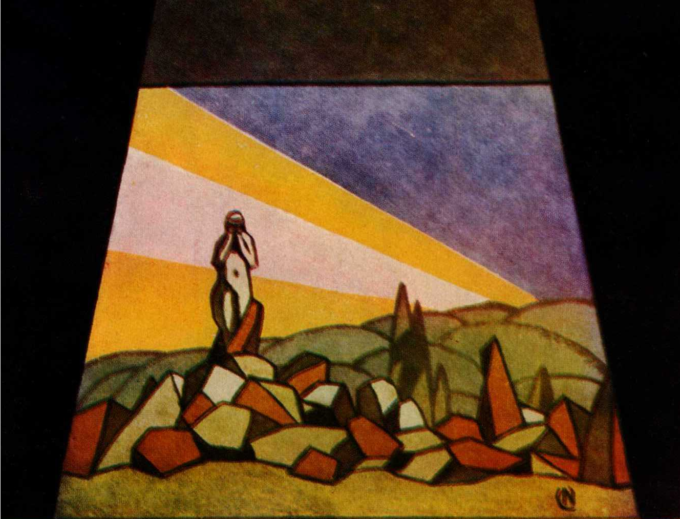 La poussière de Soleils tableau 11